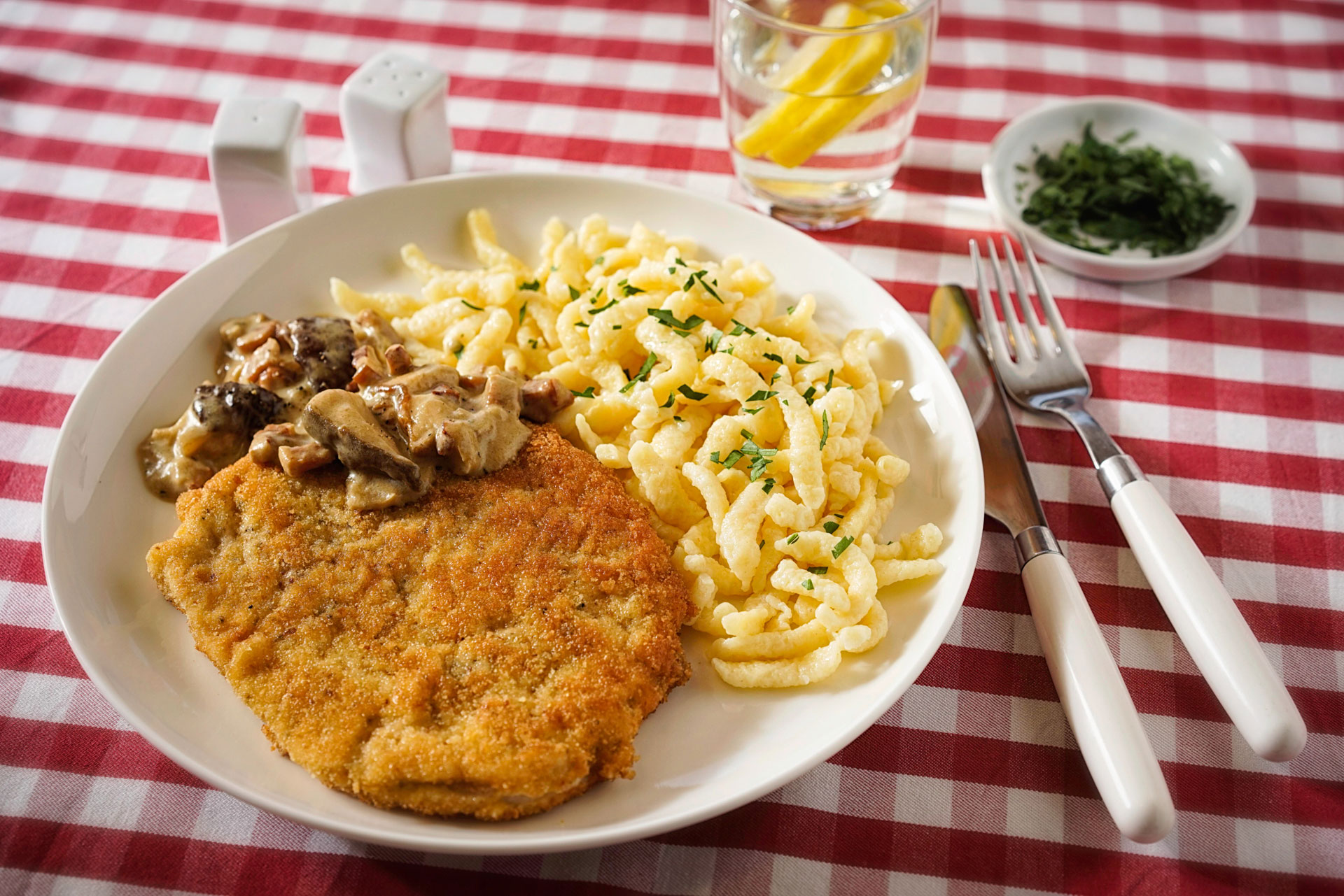 Jägerschnitzel mit Champignonrahmsauce und Spätzle